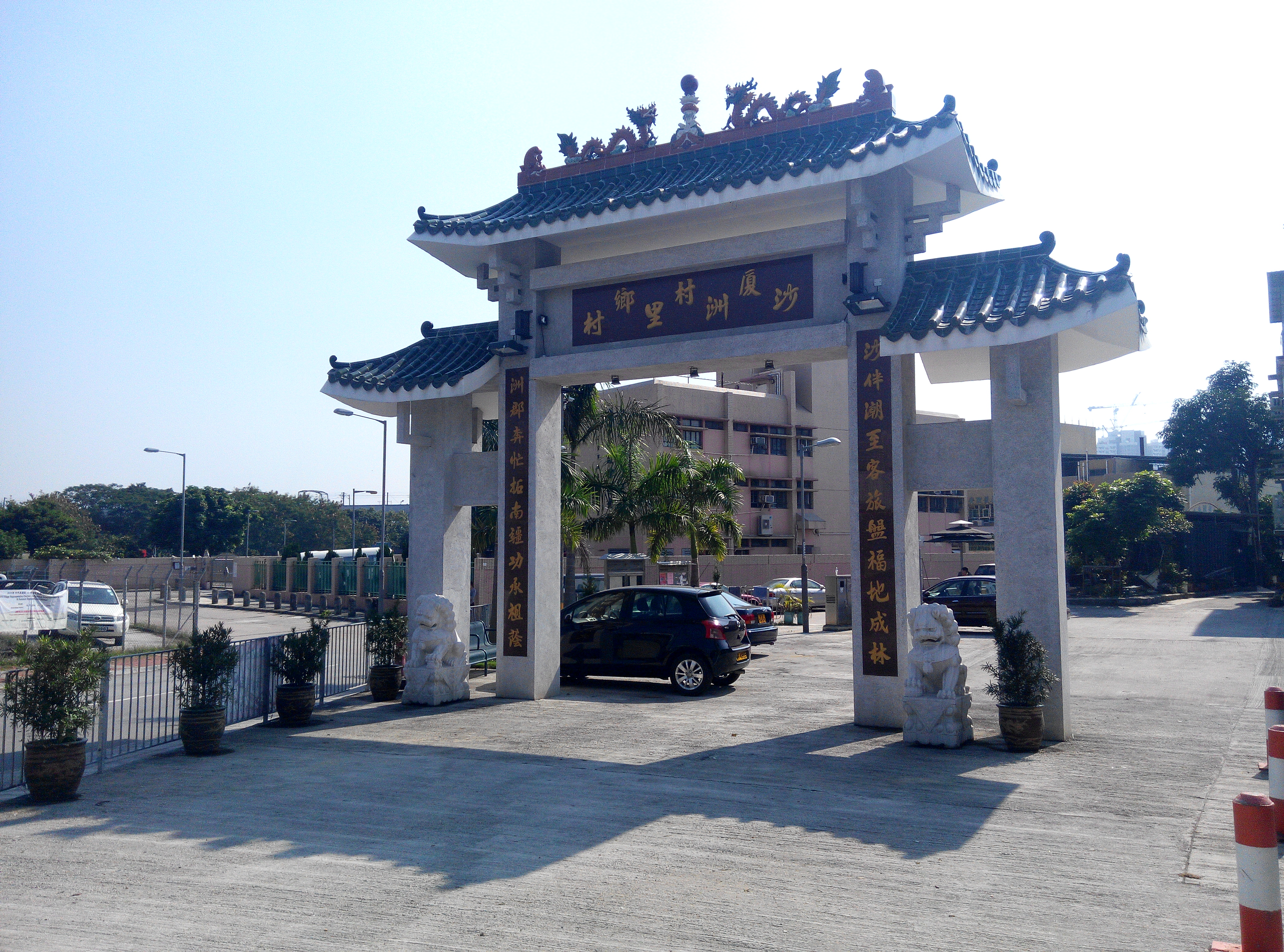 沙州里村牌坊